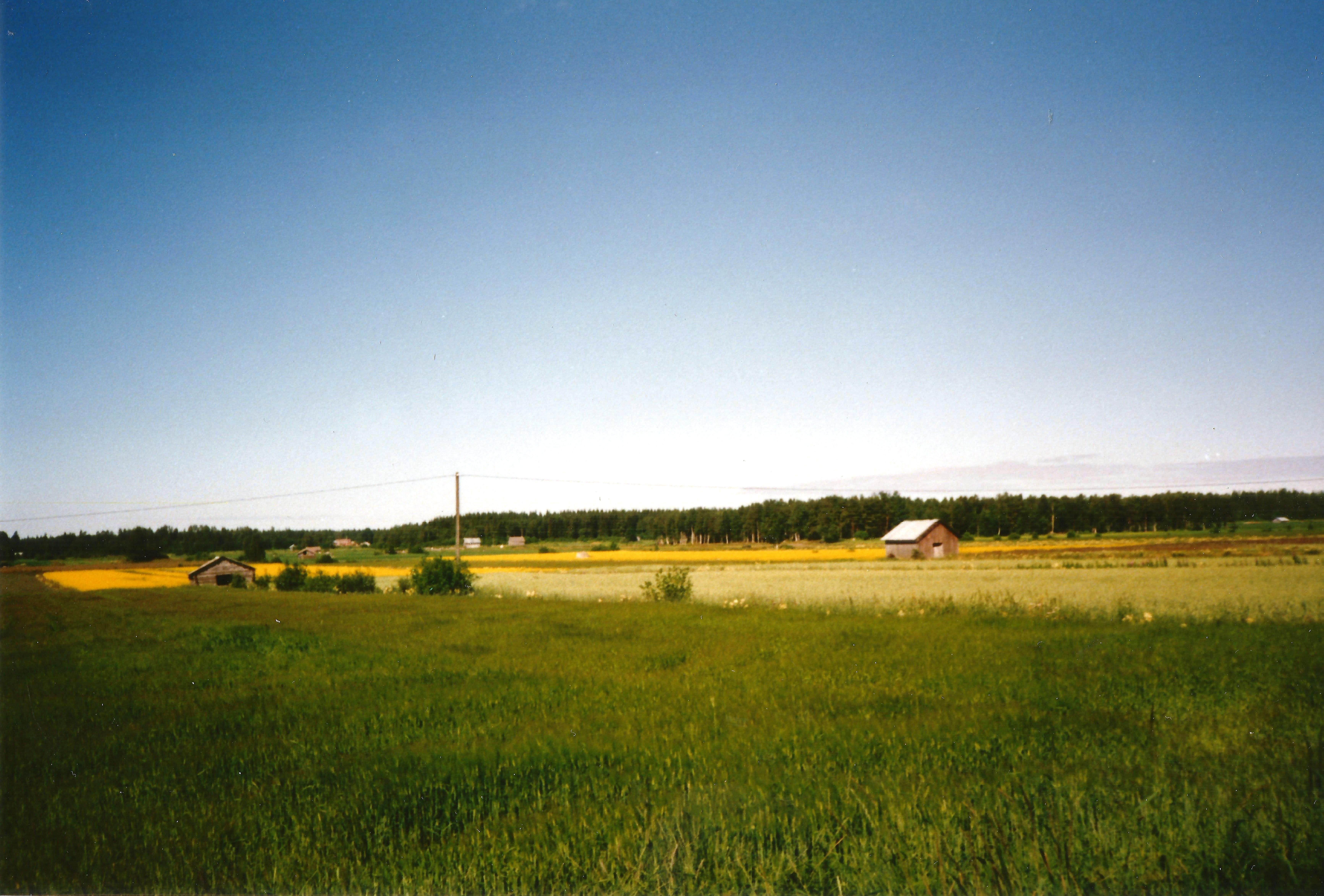 Jordbrukslandskapet kring bykärnan i Ömossa, sommaren 1992.